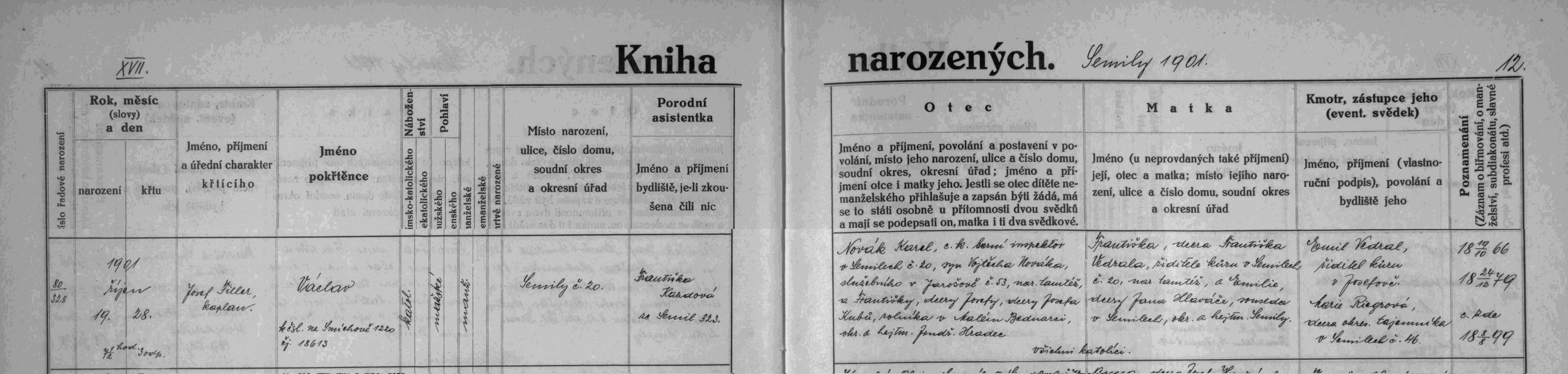 matrika N Semily SOA Zámrsk 1901, zápis o narození malíře V.V.Nováka